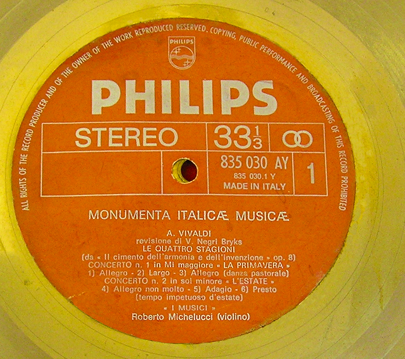 Disco d'oro consegnato a Roberto Michelucci per il superamento del milione di copie vendute delle "Quattro Stagioni" di A. Vivaldi